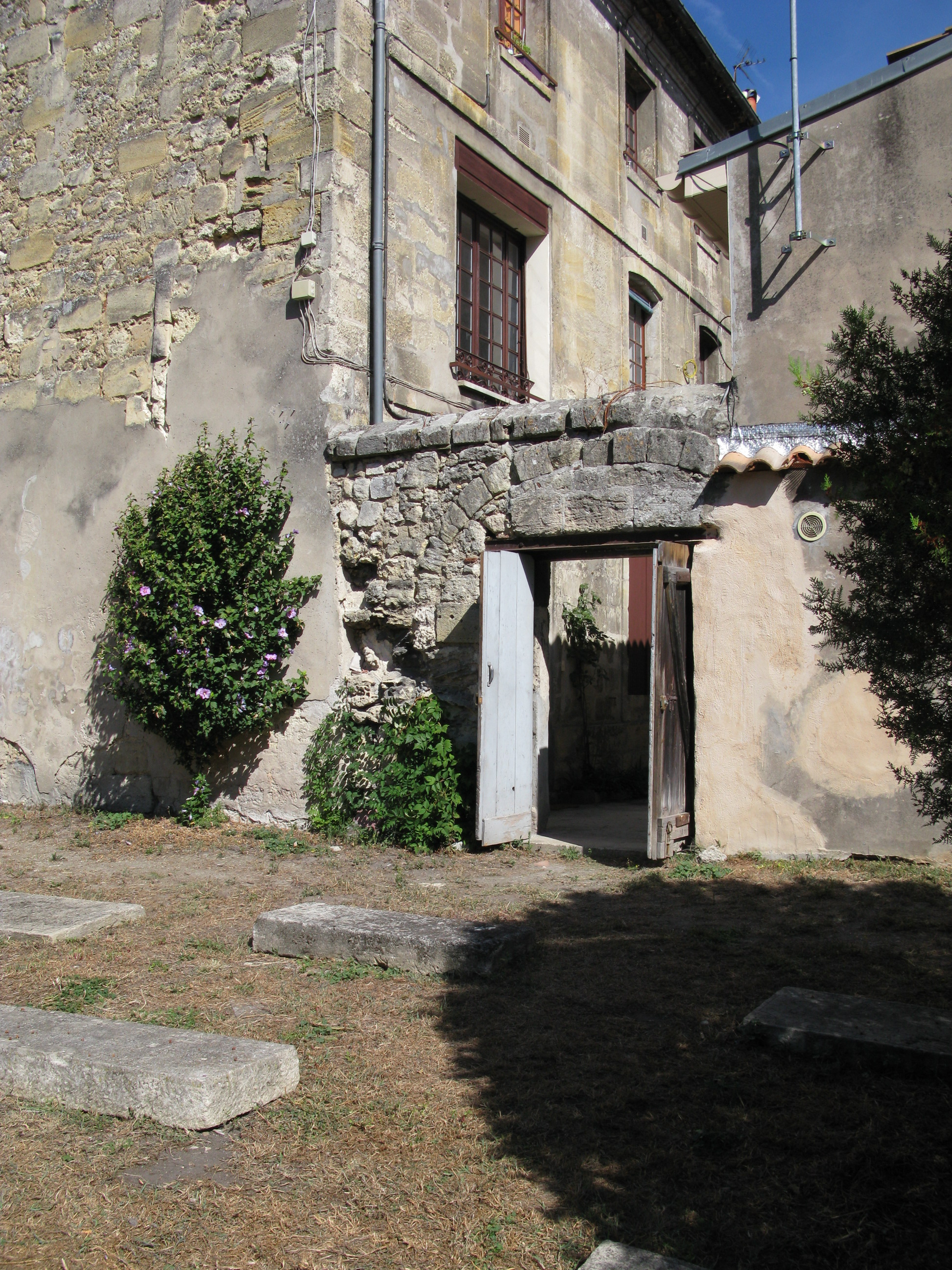 Vue d'ensemble du cimetière des portugais, au 105 cours de la Marne à Bordeaux.